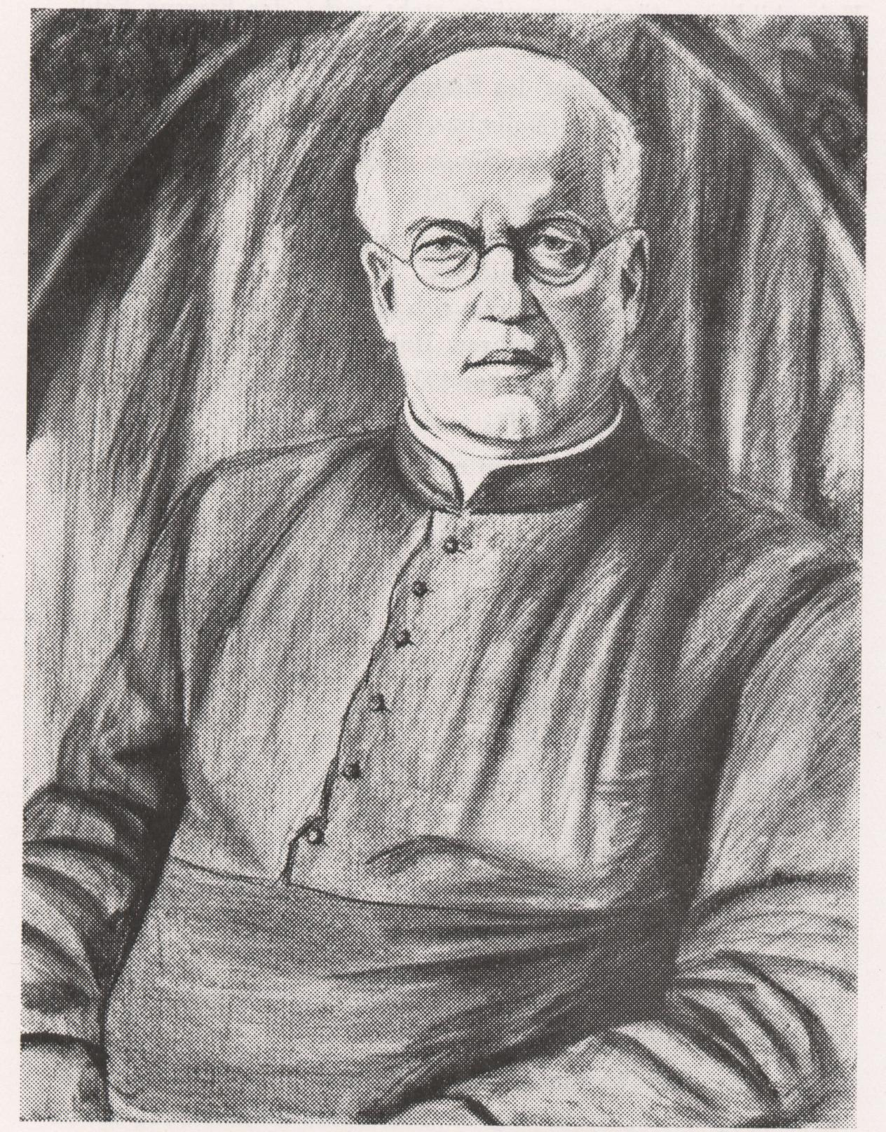 Pfarrer Louis Pinck, Diözese Metz, Lothringer Volkskundler